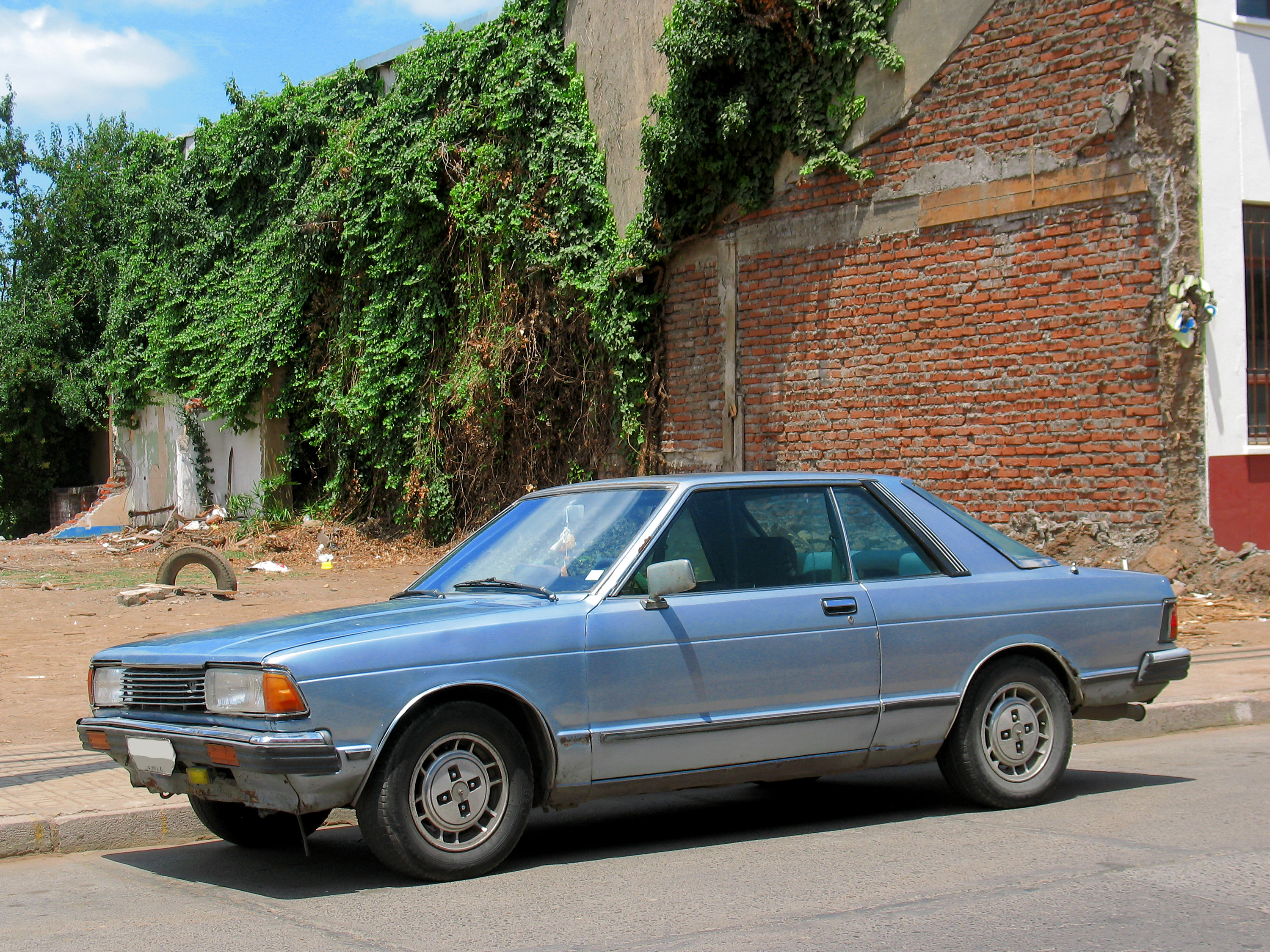 Datsun Bluebird 1.8 SSS Coupe 1981